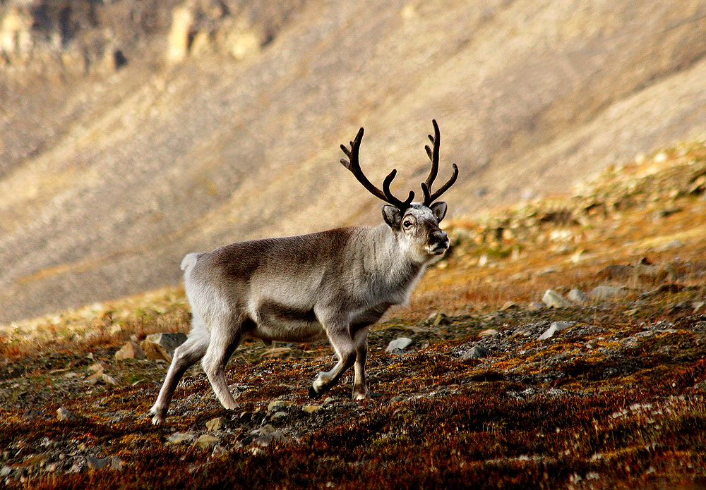 Svalbardrein, Spitsbergenrein.Rangifer tarandus platyrhynchus.